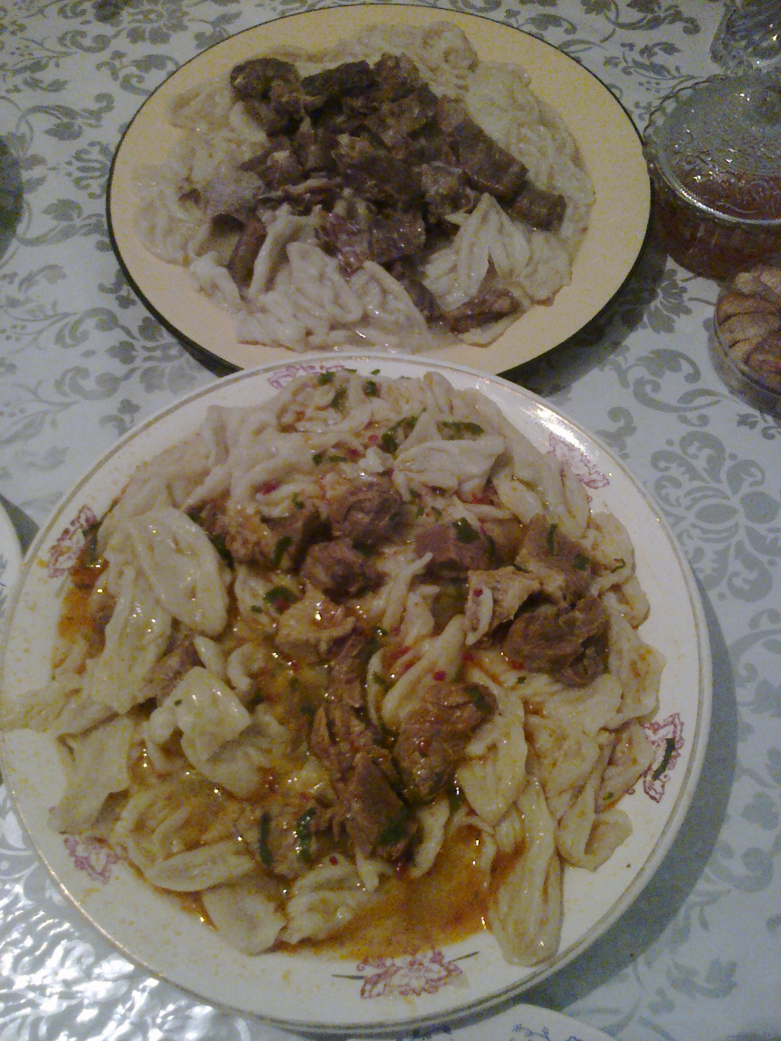 Sürhüllü yeməyi